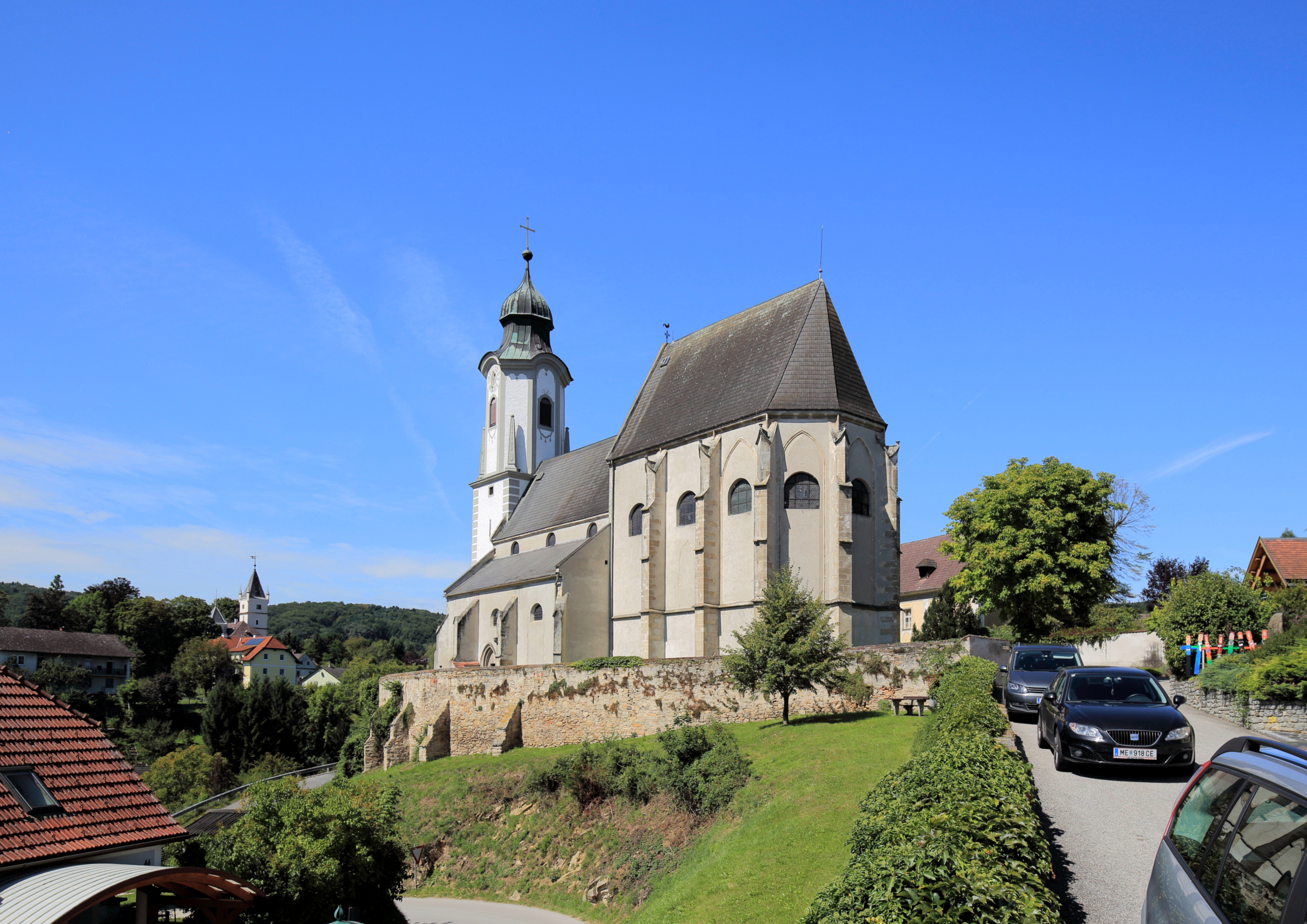 Die katholische Pfarrkirche hl. Nikolaus in der niederösterreichischen Marktgemeinde Emmersdorf an der Donau. Eine spätgotische Pfeilerbasilika, die im Süden von einer spätmittelalterlichen Futtermauer mit wuchtigen Strebepfeilern umgeben ist. Der Langchor wurde im 4. Viertel des 15. Jahrhunderts errichtet. Das wuchtige Untergeschoß des vorgestellten Westturmes stammt ebenfalls aus dem 15. Jahrhundert. 1738 wurde dem ein barocker oktogonaler Aufsatz mit 4 Eckobelisken aufgesetzt.